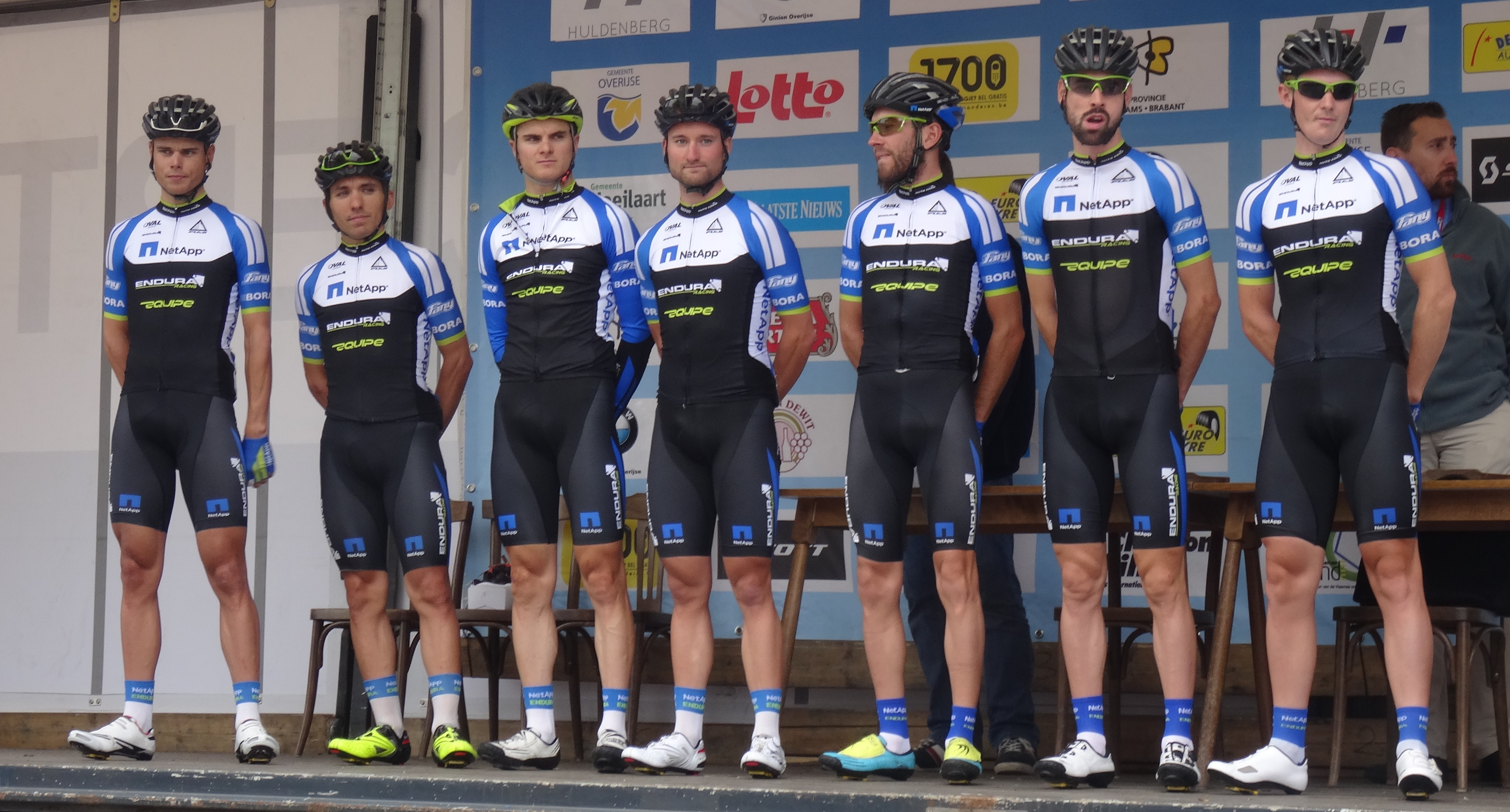 Reportage photographique réalisé le mercredi 27 août à l'occasion du départ de la Druivenkoers Overijse 2014 à Huldenberg, Belgique.